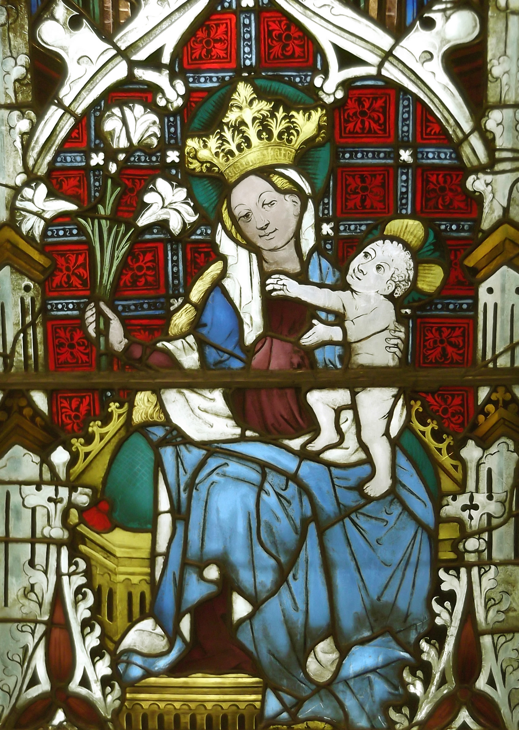 Spätgotisches Fensterglas mit Madonna und Kind. Ehemals Karmeliterkirche (Boppard). Ausgestellt im Hessischen Landesmuseum Darmstadt